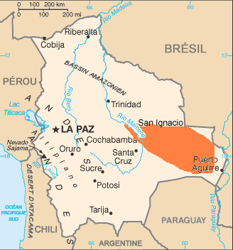 Aire géographique de la langue chiquitano (Bolivie) Modification personnelle (Utilisateur:Croquant) de la carte de la Bolivie provenant du CIA World Factbook - meilleure qualité que son équivalent jpeg. Source WP